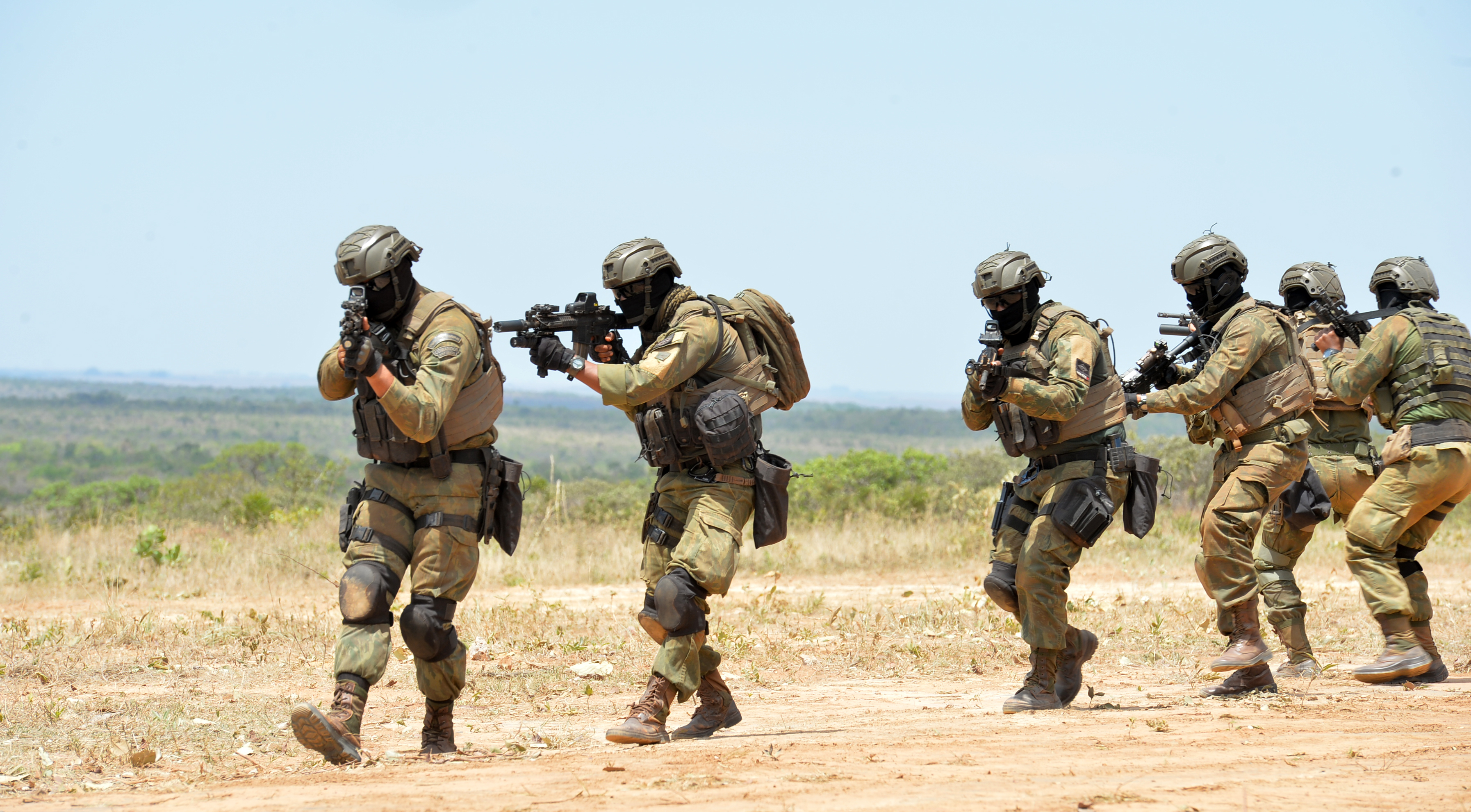 Sob sol forte e em pleno cerrado brasileiro 2,4 mil fuzileiros navais vindos do Rio de Janeiro estão em operação real de guerra. São exercícios que têm por objetivo preparar o militar da Marinha do Brasil para situações das mais corriqueiras às mais extremas. Foto: Tereza Sobreira